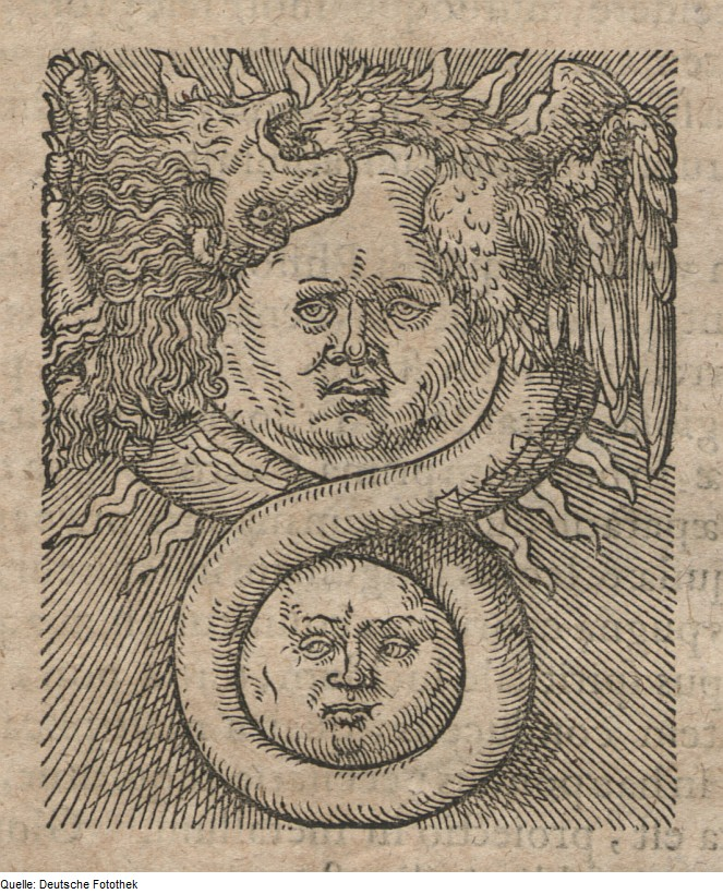 Original image description from the Deutsche FotothekTheosophie & Alchemie & Hermetik